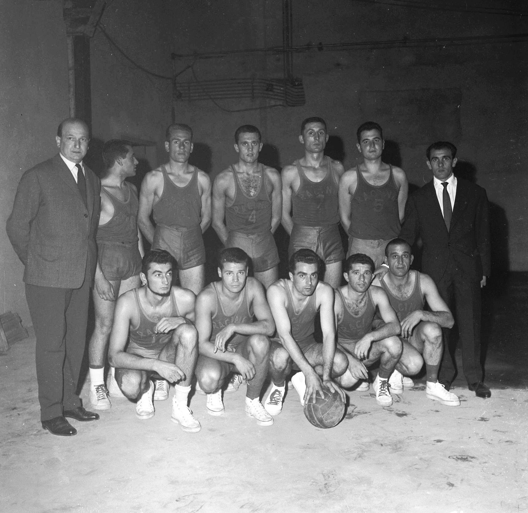 Salle du Pré Catelan. 11 Octobre 1958. Vue de l'équipe du RCM Toulouse au complet.